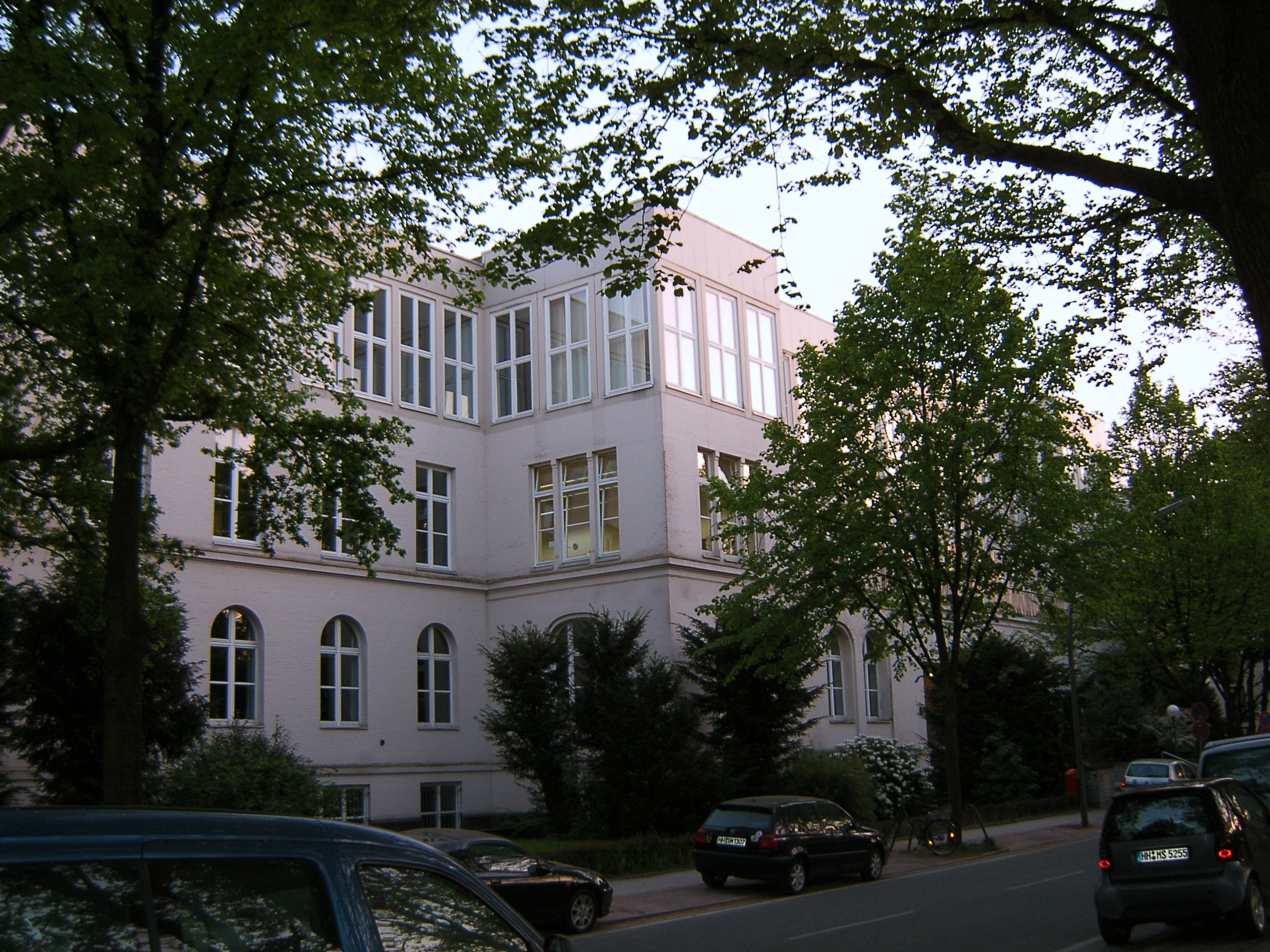 Der Modecampus Armgartstraße in hohenfelde gehört zur Hochschule für Angewandte Wissenschaften Hamburg.